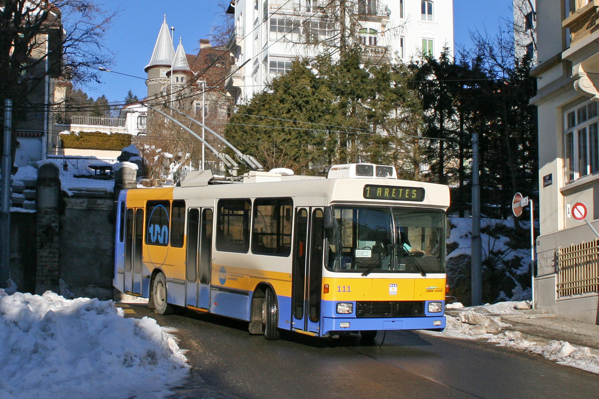 NAW/Hess/Siemens BT 5-25 Nr. 111 im Dezember 2007 auf der Linie 1 des Trolleybus La Chaux-de-Fonds